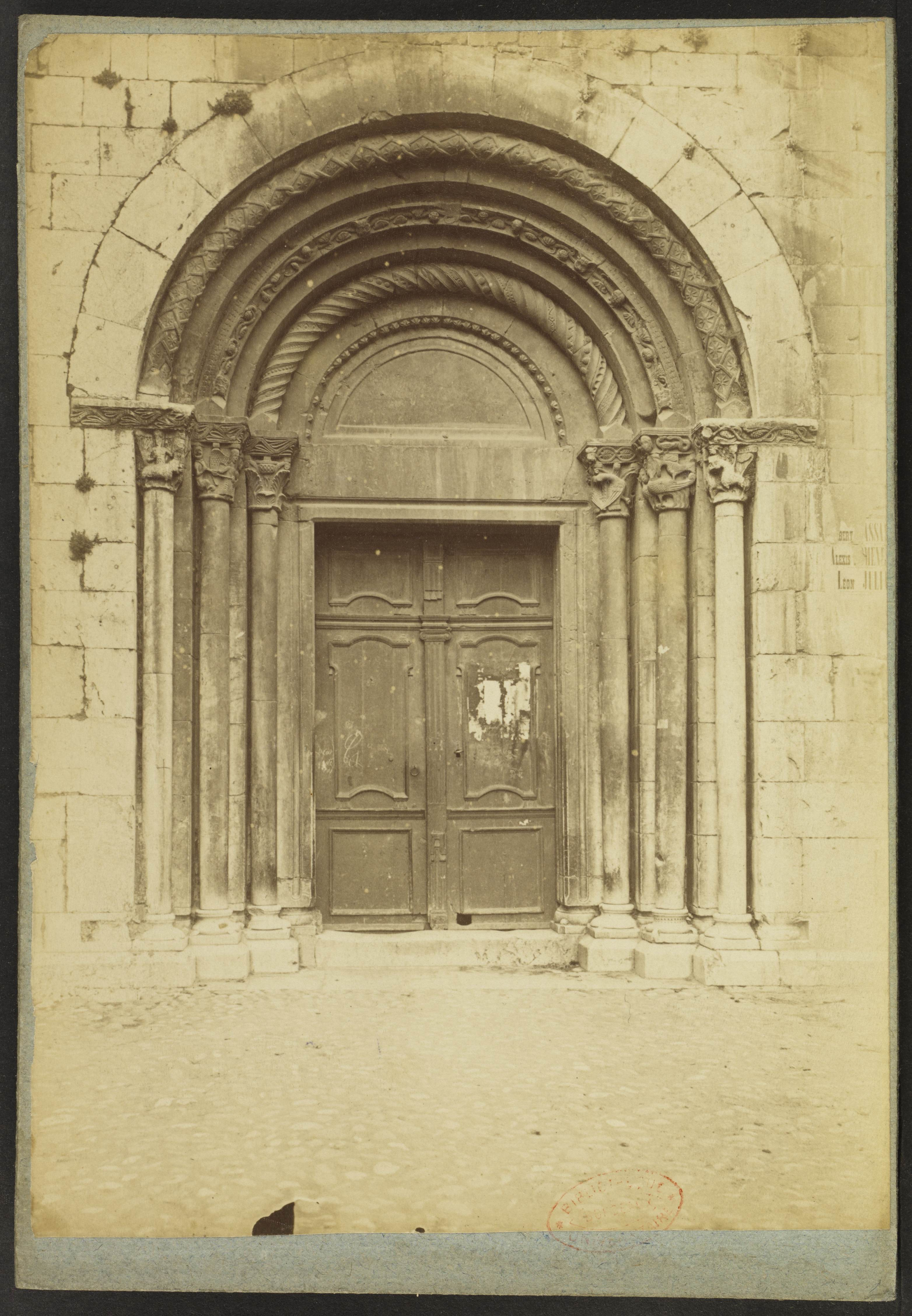 Église Sainte-Marie d'Espira-de-l'Agly; Porte